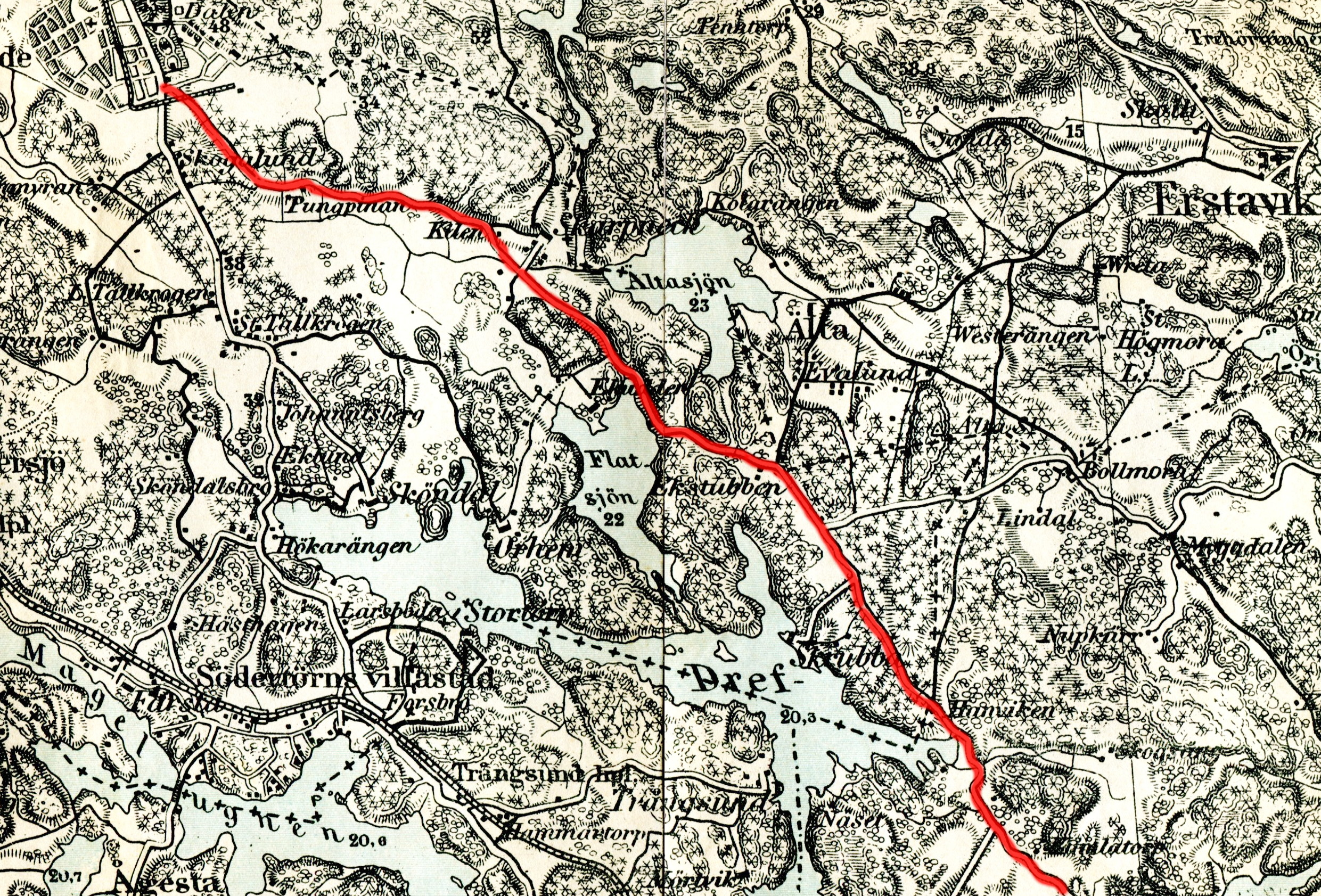 Sträckning av landsvägen mellan Enskede och Tyresö (Gamla Tyresövägen)